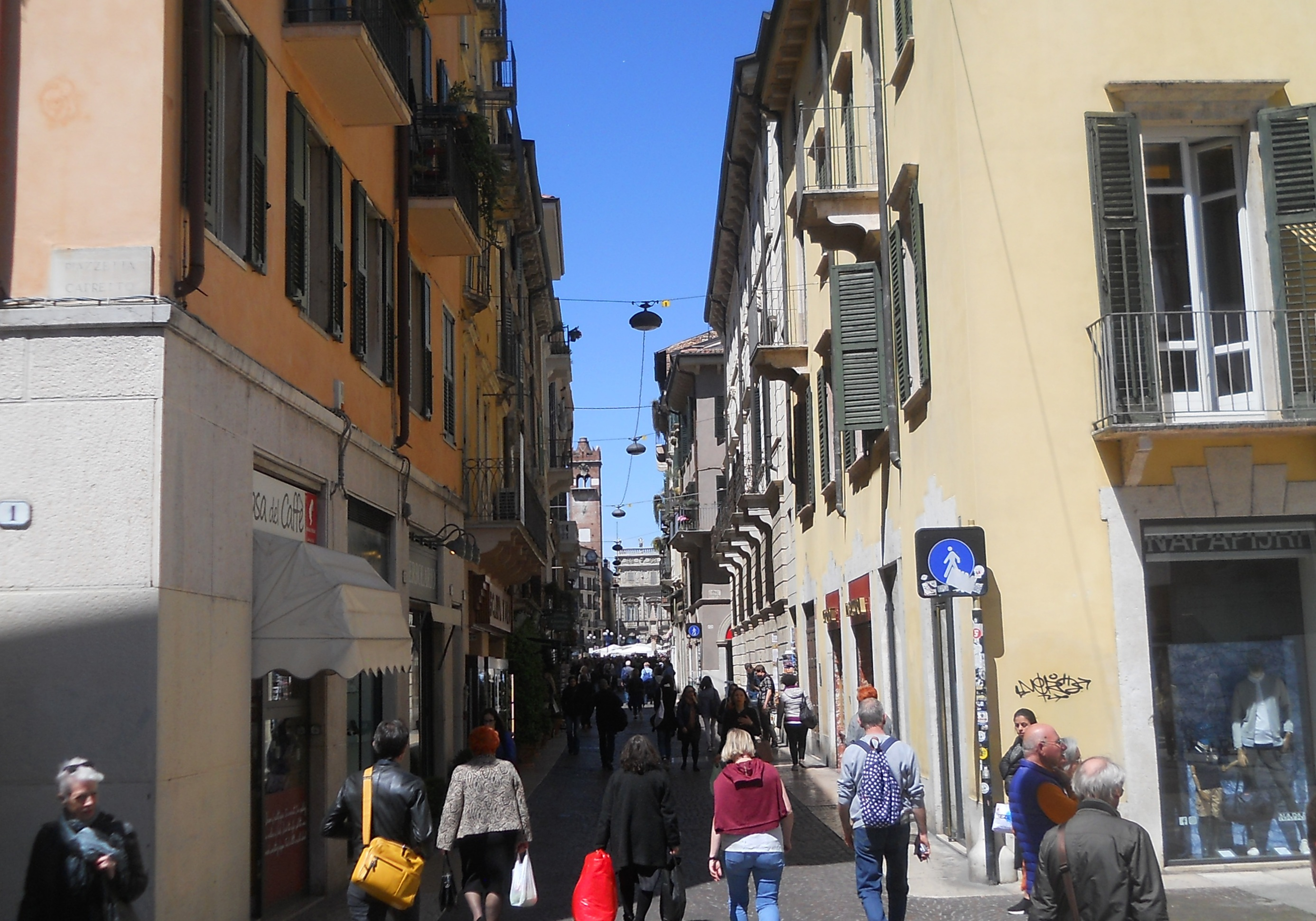 Inizio di via Cappello a Verona, in fondo piazza delle Erbe